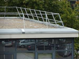 Barandillas para cubiertas no accesibles al publico